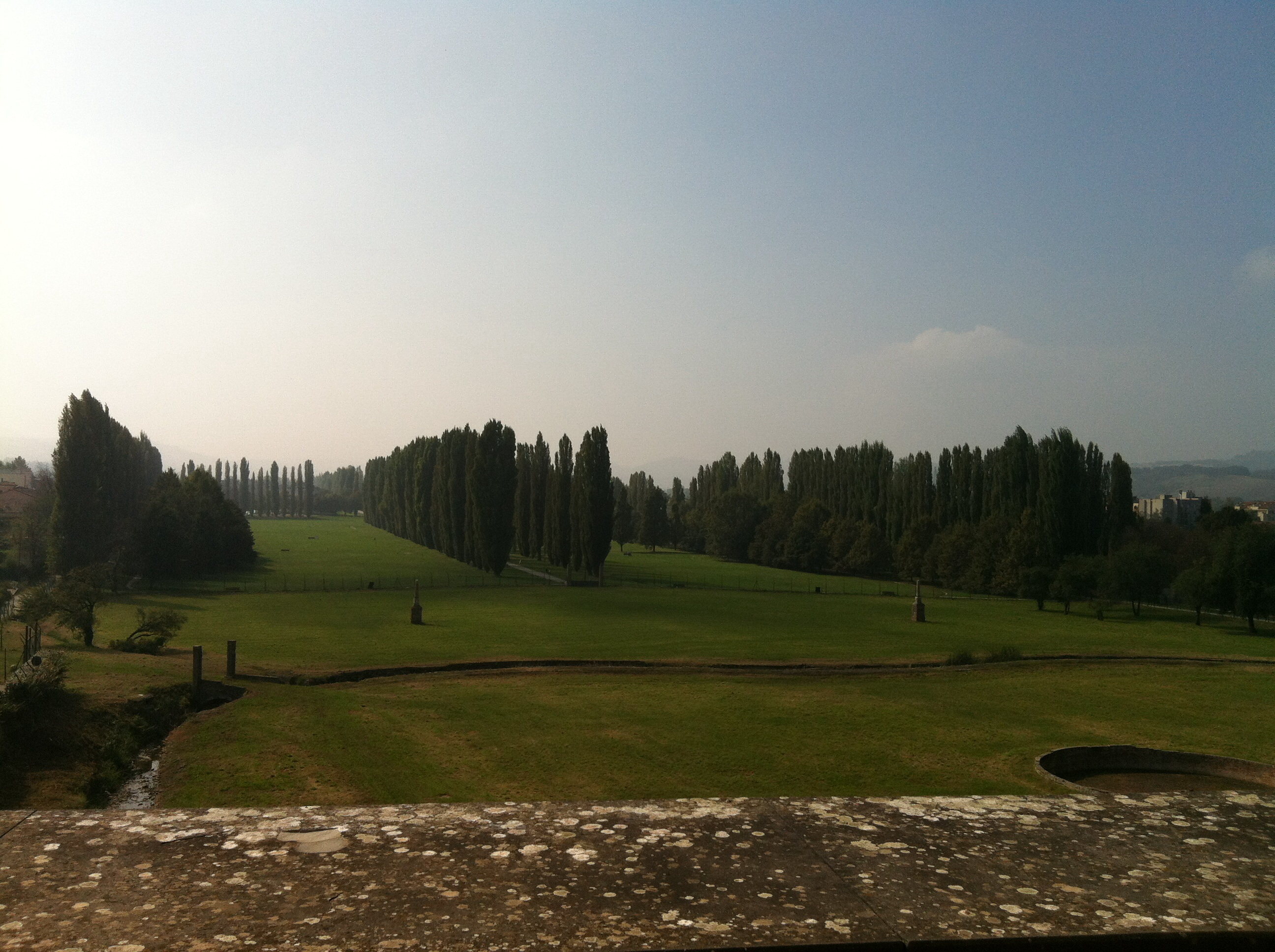 Parco Ducale - MIBAC This is a photo of a monument which is part of cultural heritage of Italy.